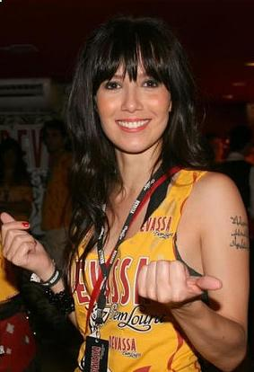 Marjorie Estiano (dir.) chega no camarote Devassa.